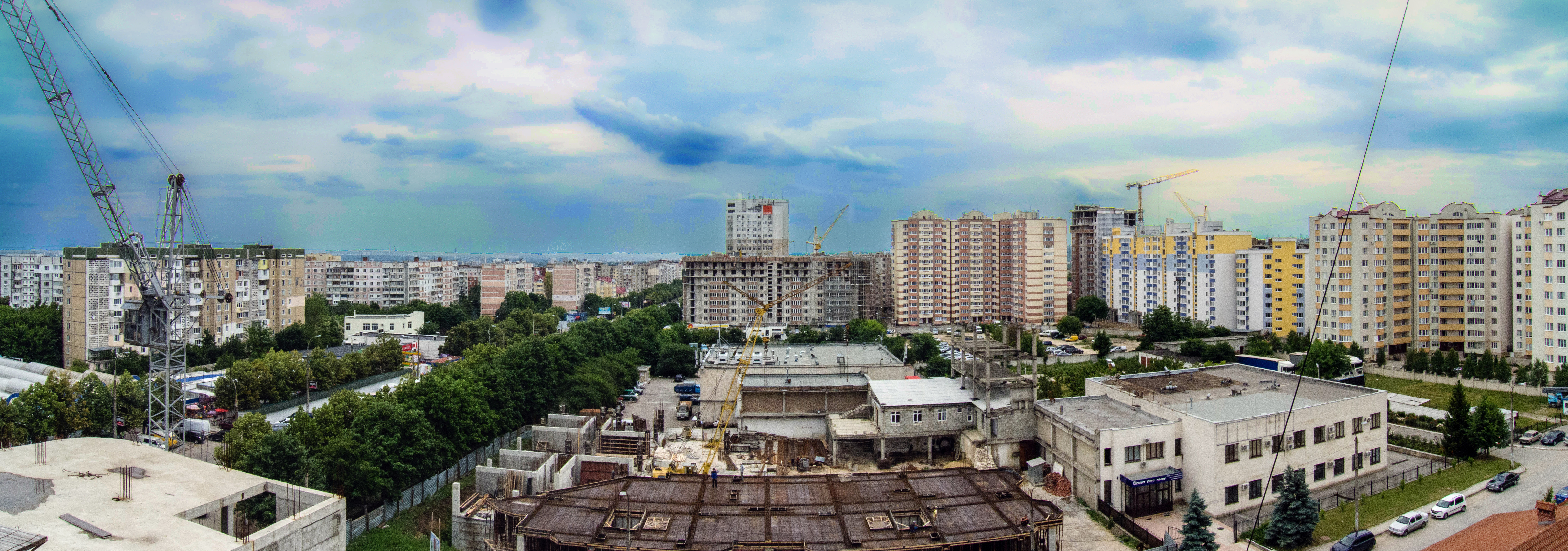 strada Alba-Iulia, intersecţie cu str. Deleanu